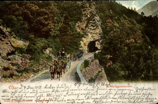 Schanfiggerstrasse